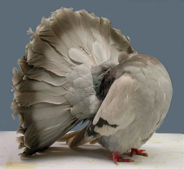 A silver barred Fantail pigeon.